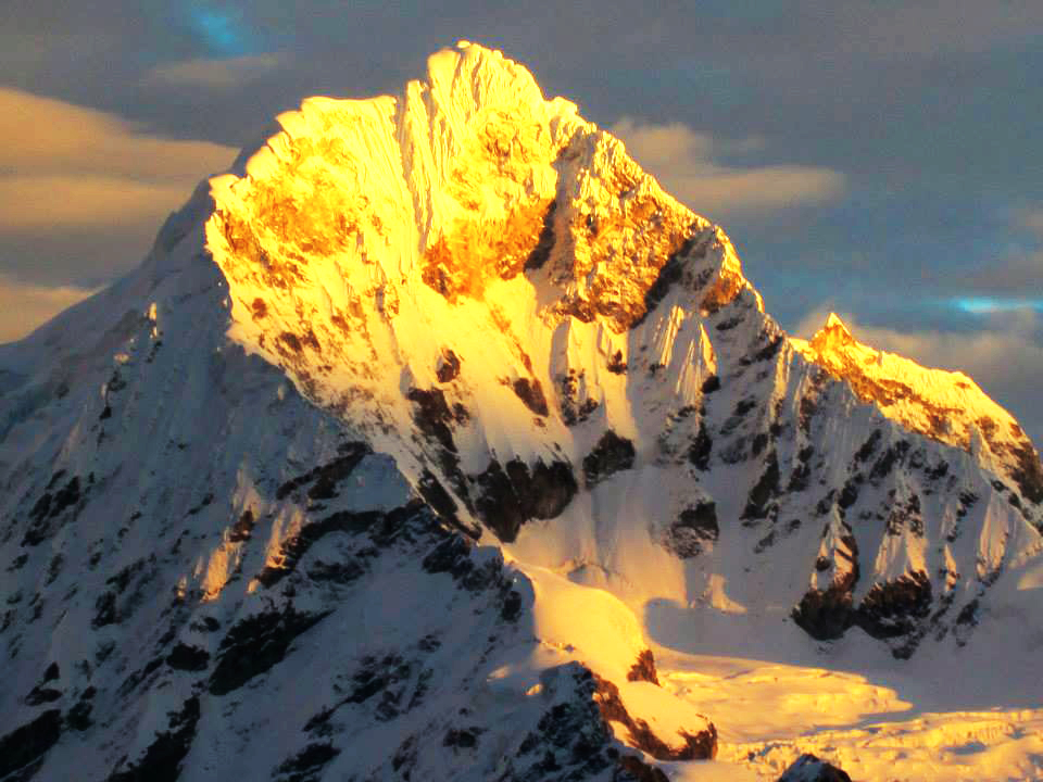 Vista de la caras sur y este del Chopicalqui